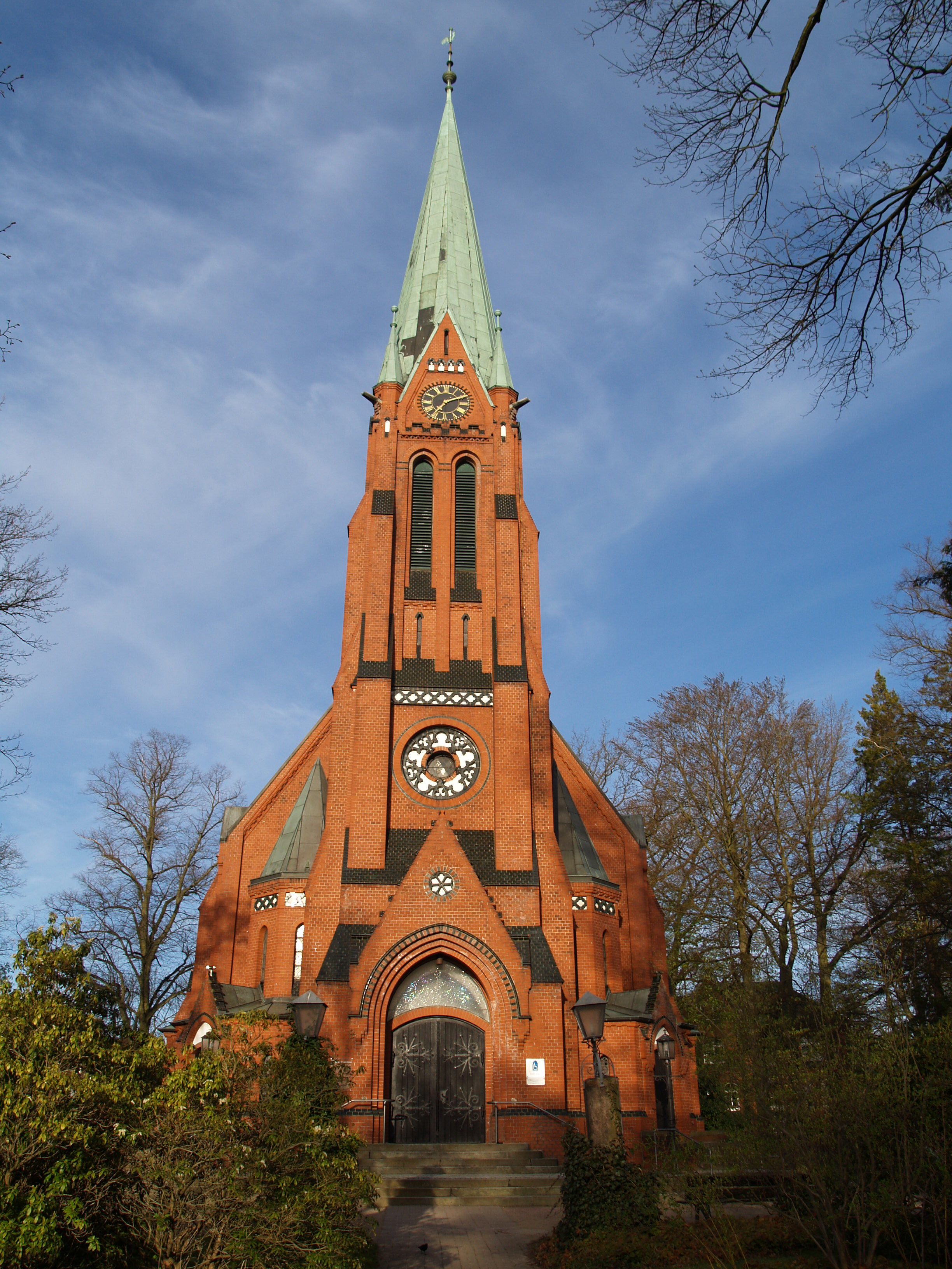 Kirche St. Maria Magdalena in Reinbek, Kreis Stormarn, Deutschland